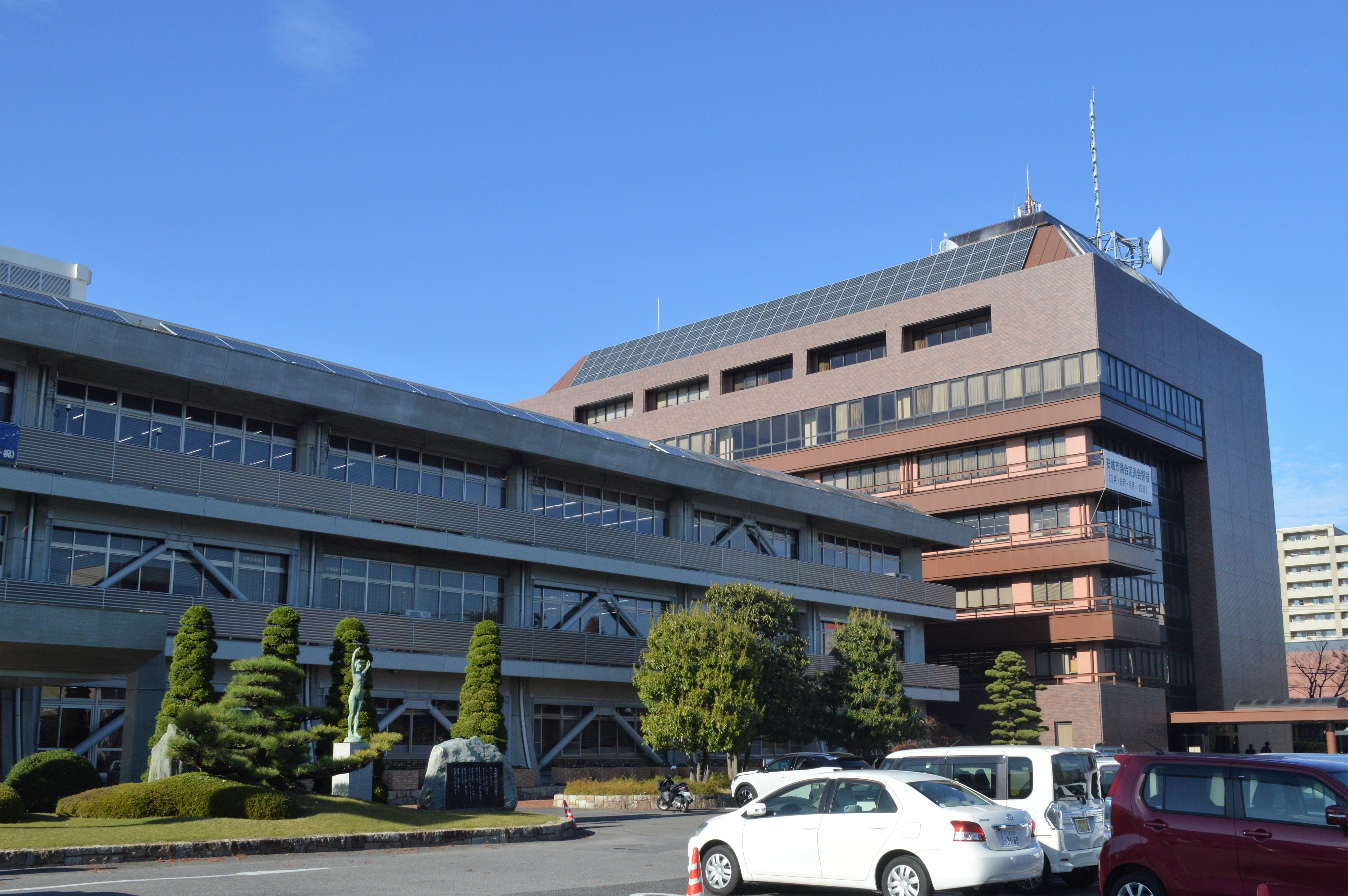 愛知県安城市の安城市役所。